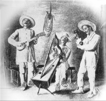 Venezuelan Joropo